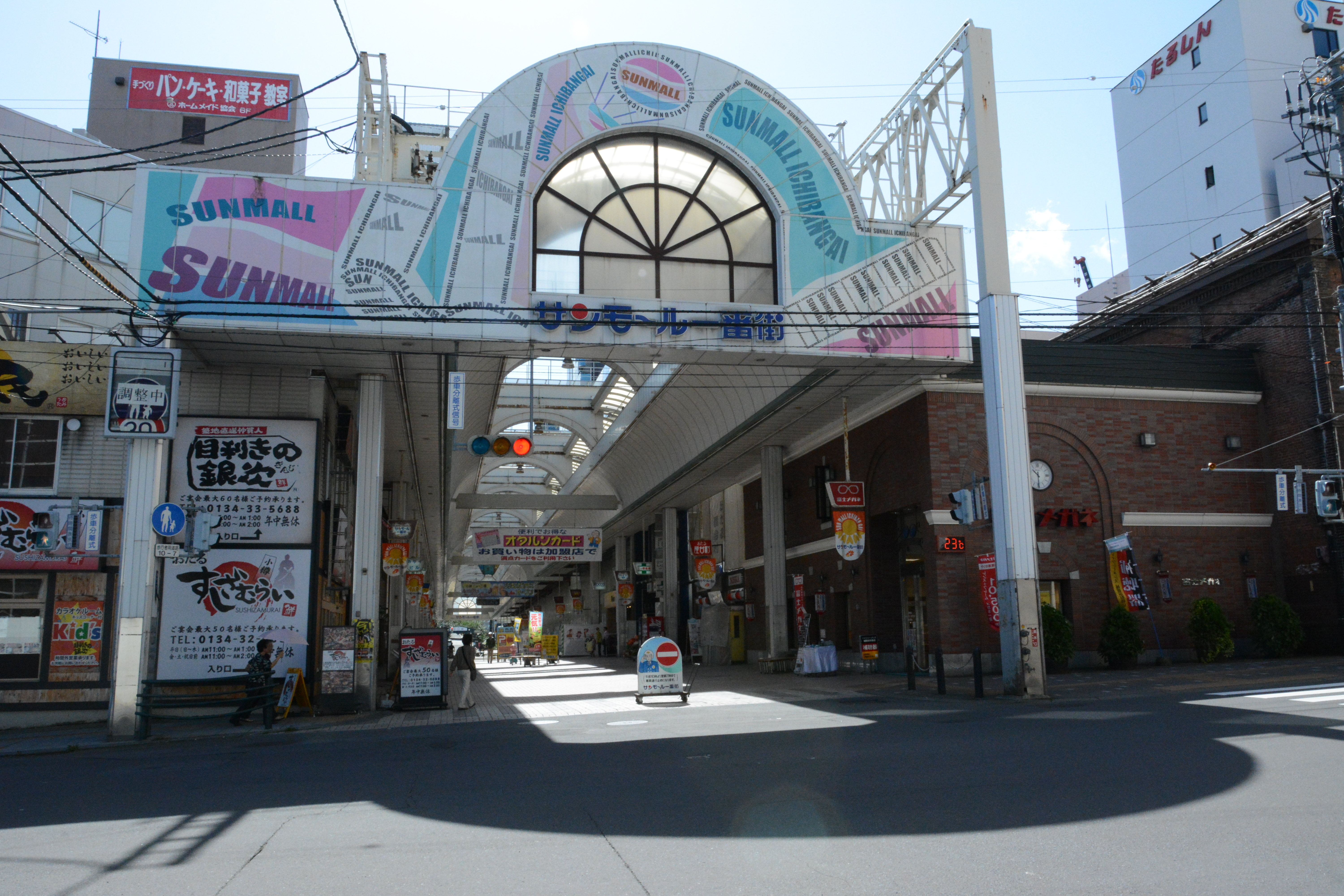 小樽市のサンモール一番街入口